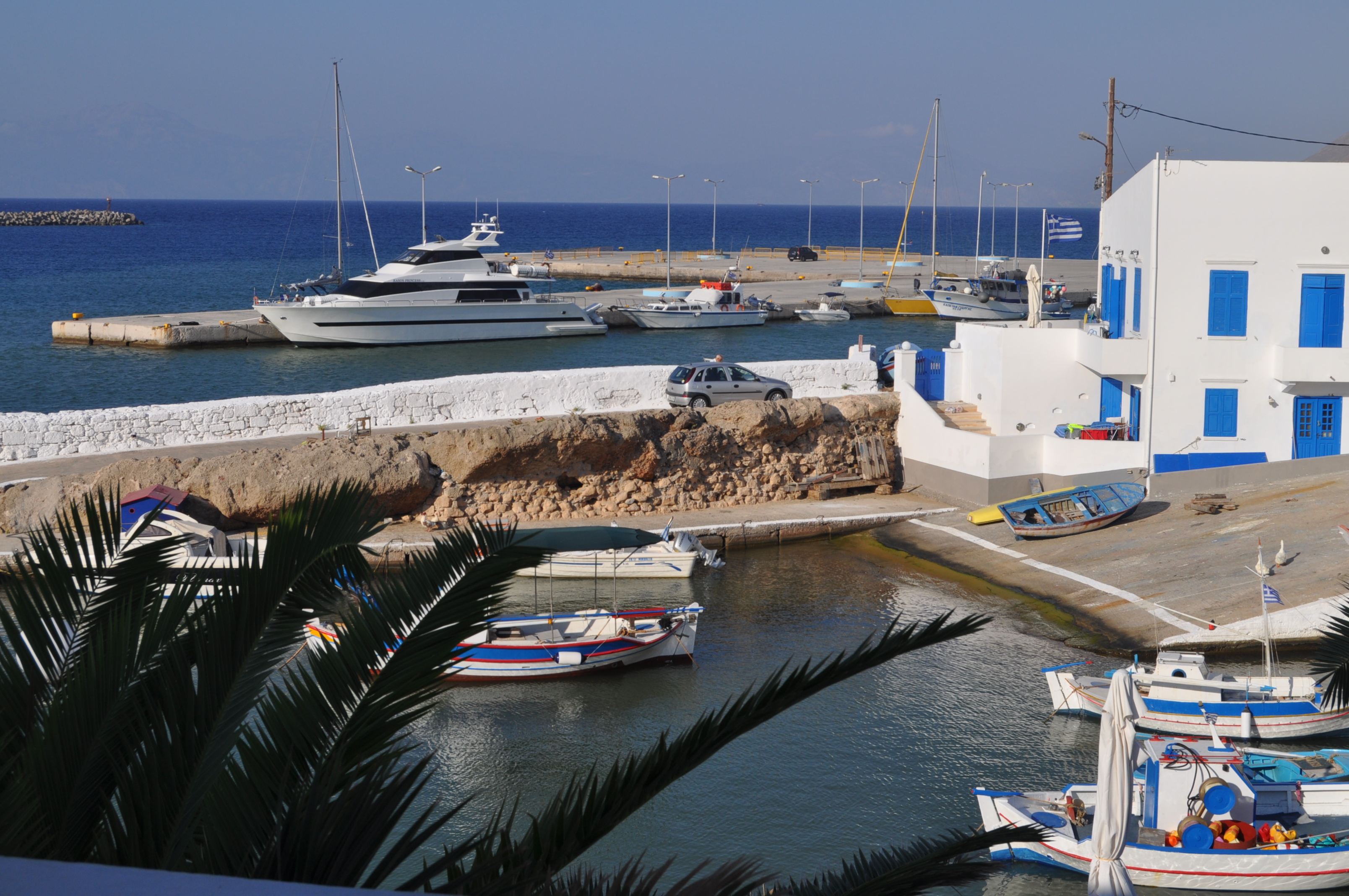 Δωδεκάνησα , Κάσος This is a photography of Natura 2000 protected area with ID GR4210001